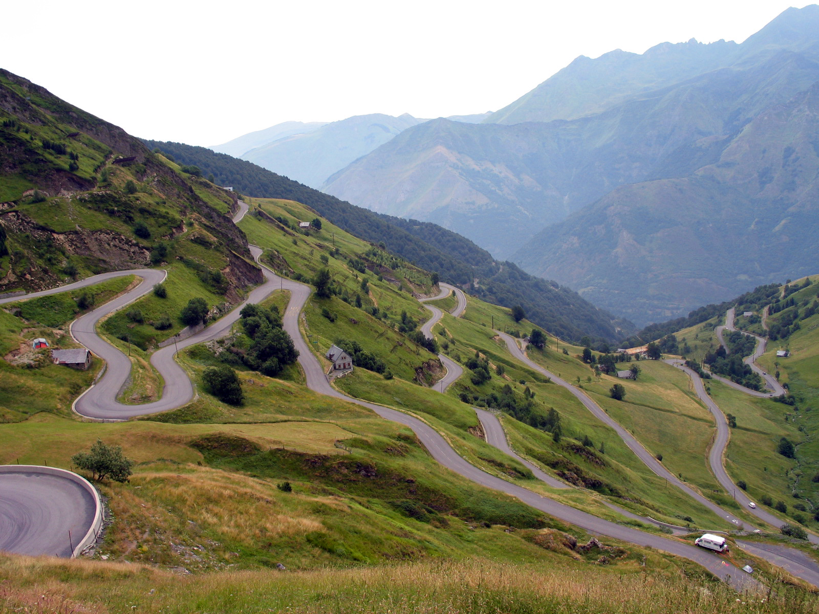 Luz Ardiden